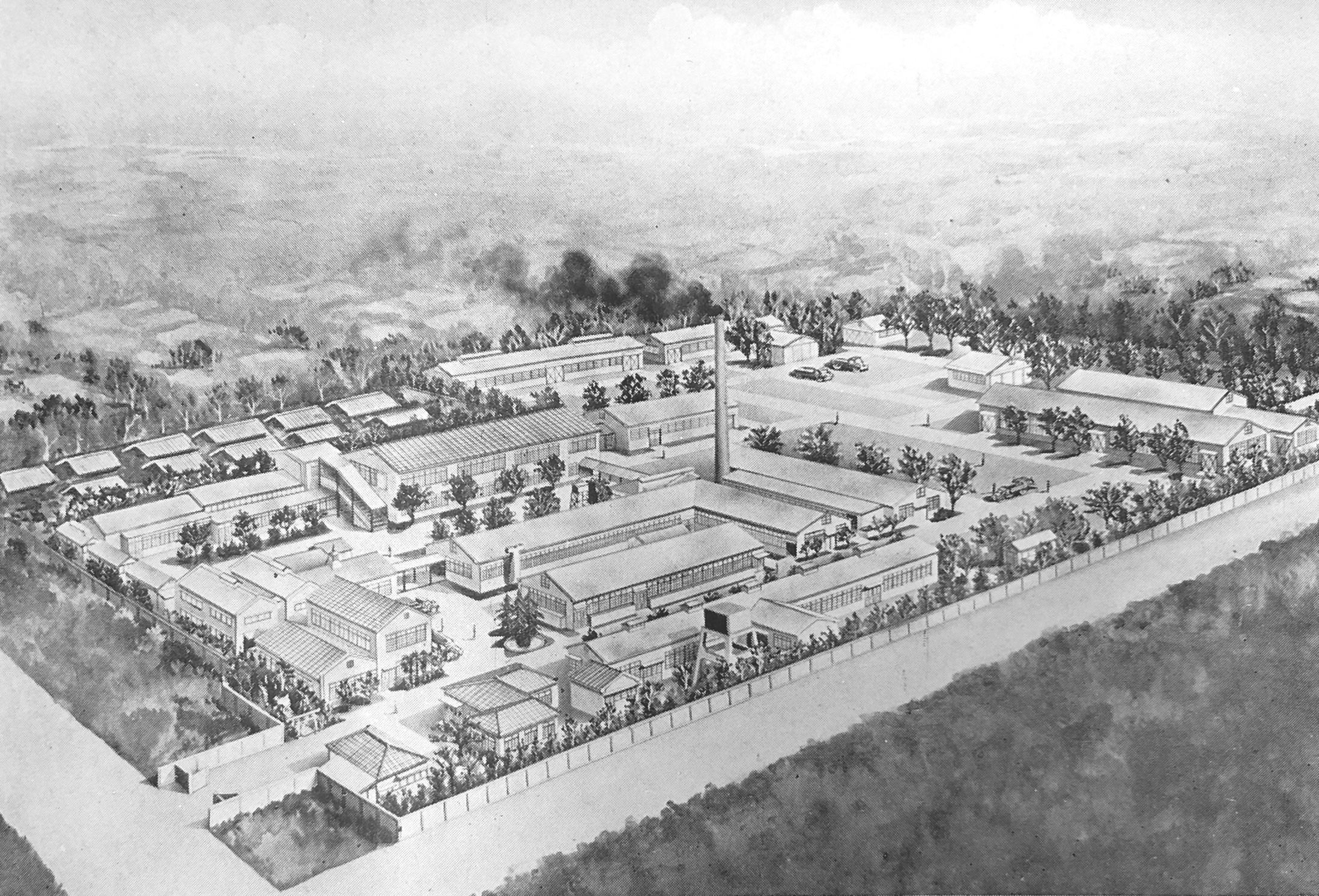 1950年代の工場